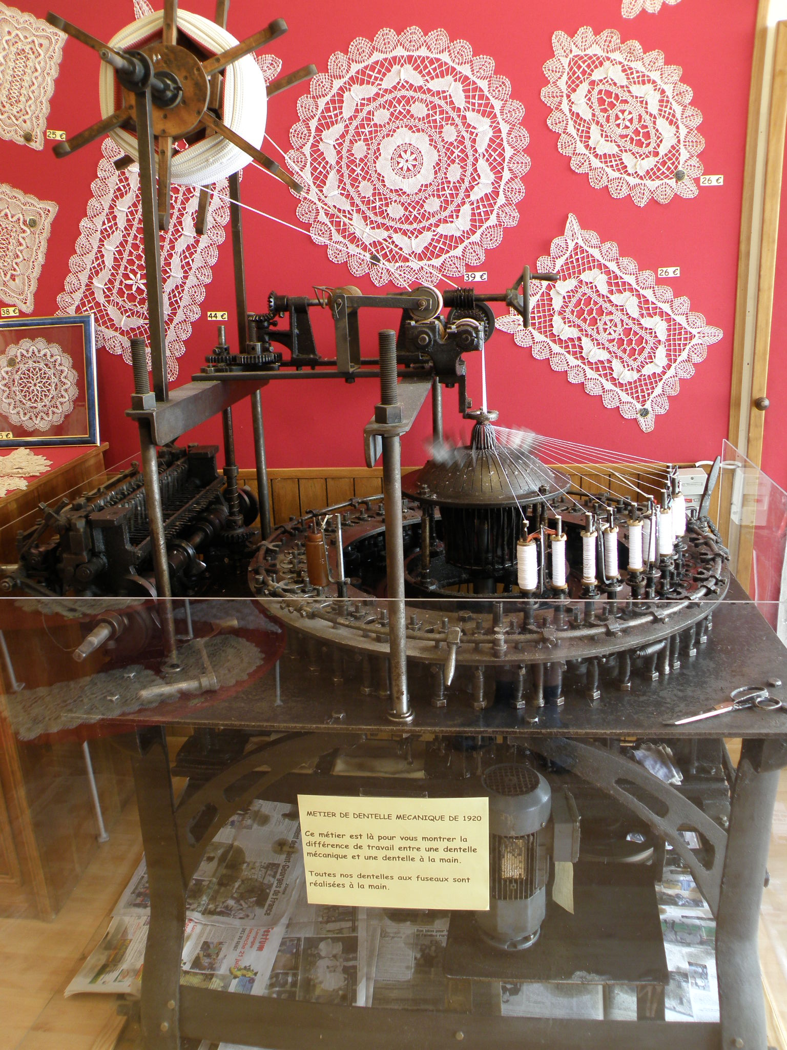 Métier de dentelle mécanique de 1920, exposé dans un magasin de dentelles, rue des Tables, au Puy-en-Velay.